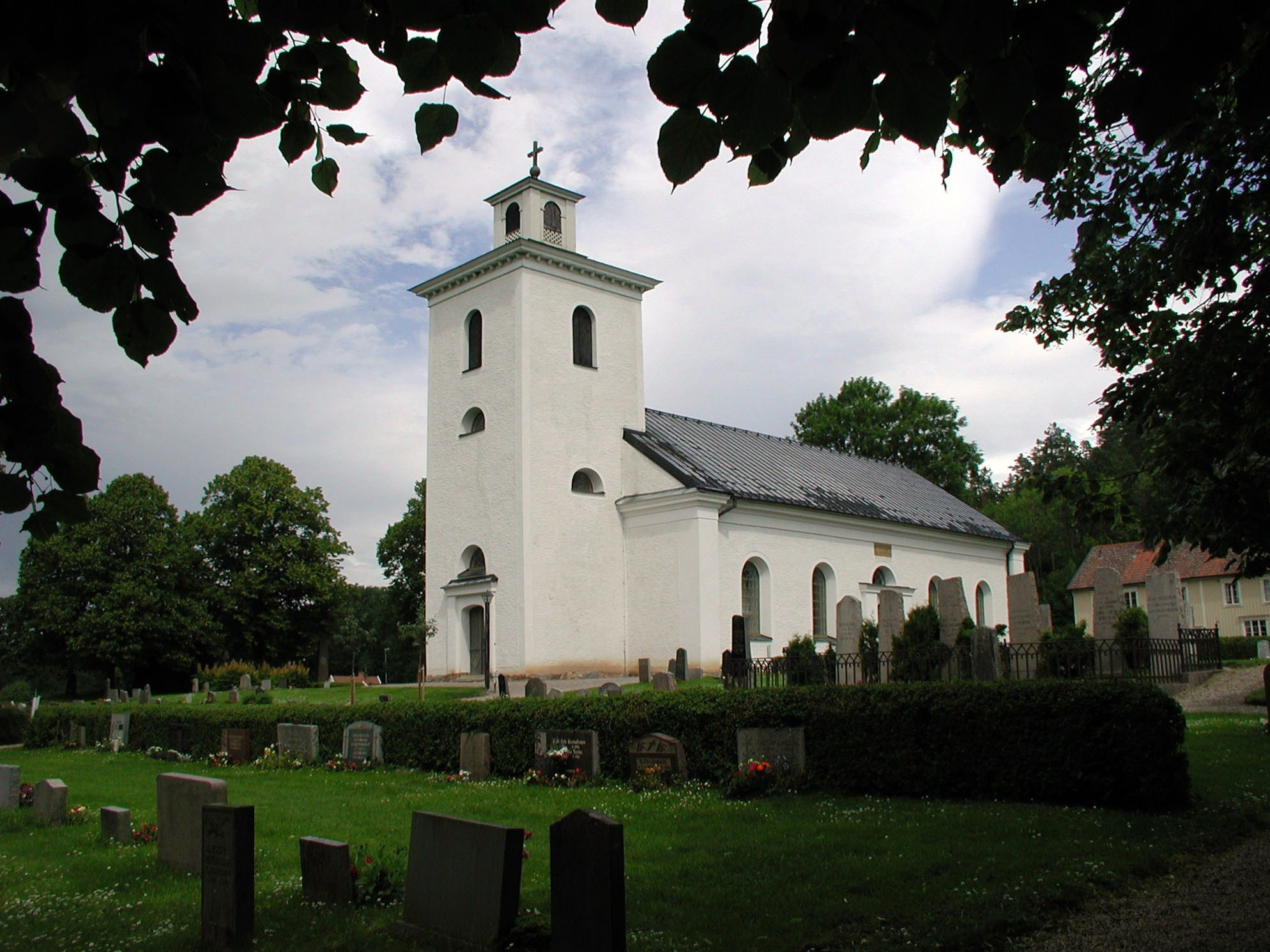 Västra Harg kyrka.